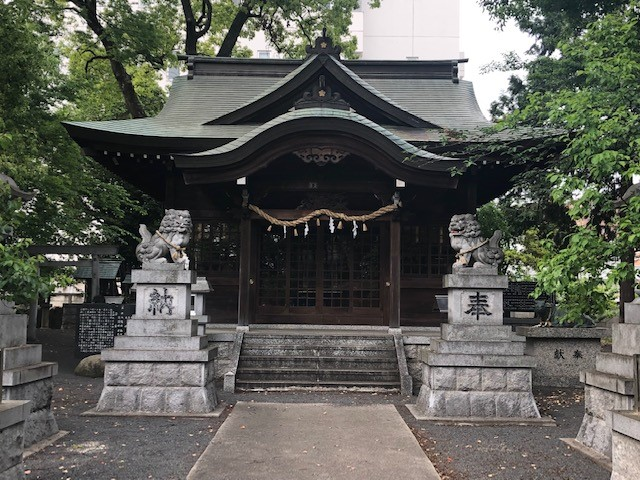 5月7日 春日井市勝川町 天神社 本殿